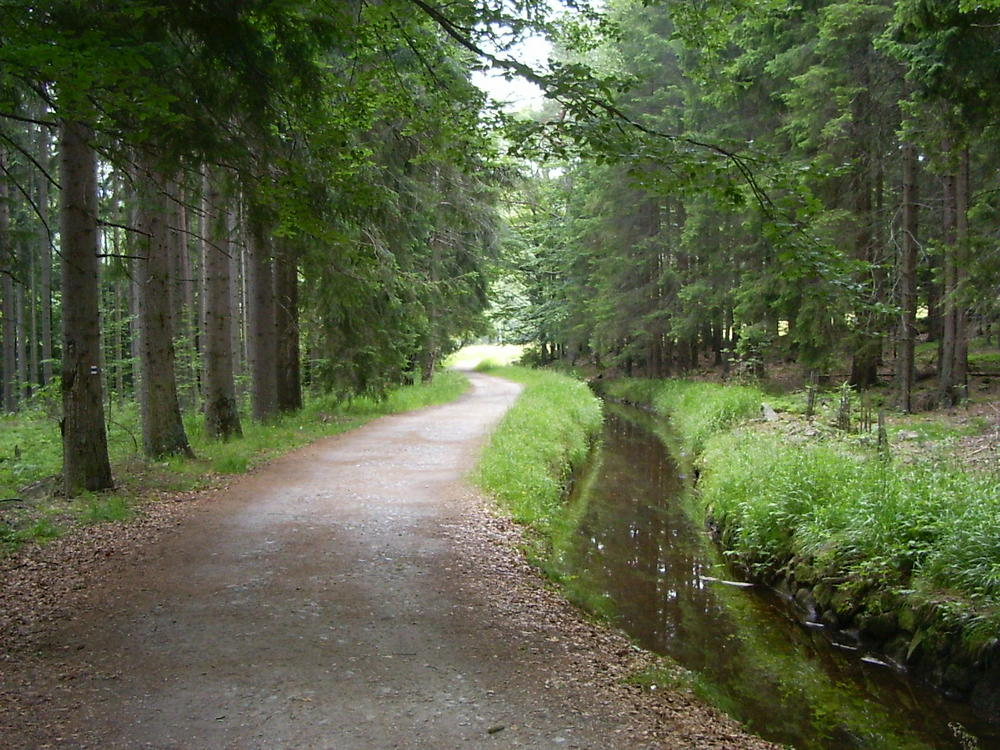 Der Kanal zwischen Jelini Vrchy / Hirschbergen und der Oesterreichischen Grenze